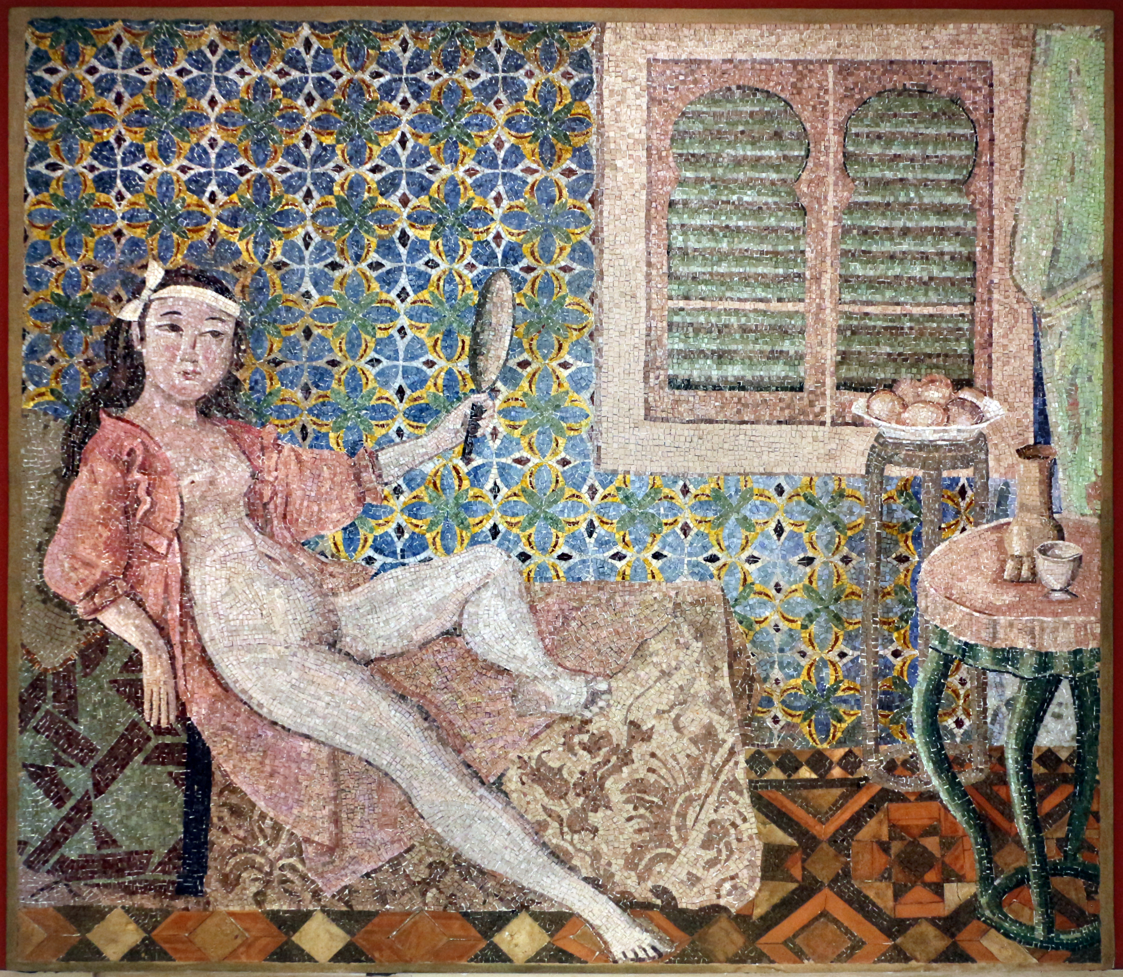 Collezione Mosaici Moderni - NB: Museum explicitly authorized the upload of its contemporary art collection for WLM 2016 (for further info ask WLM Italy organizators). This is a photo of a monument which is part of cultural heritage of Italy.